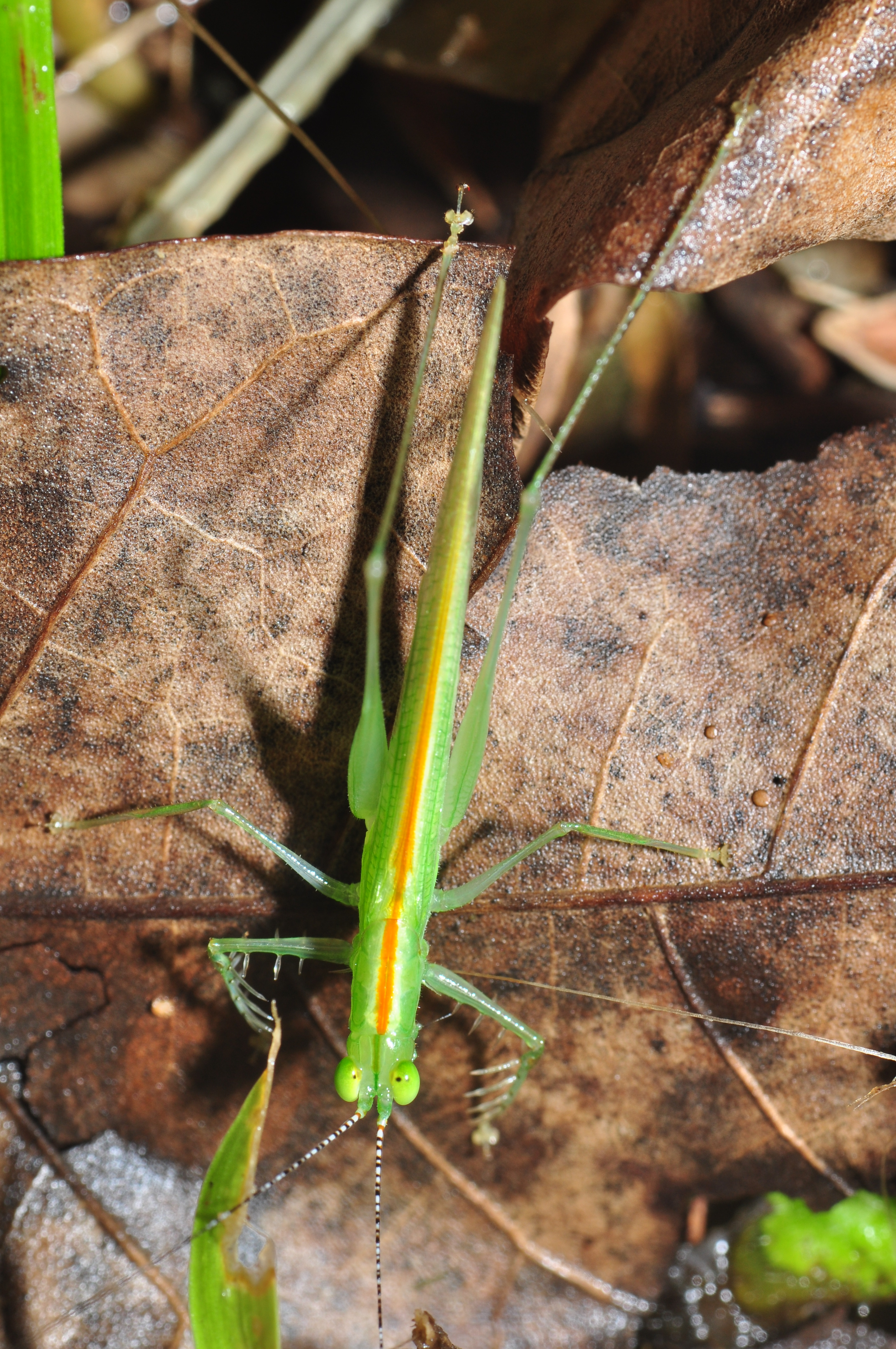 Carnivorous katydid Phlugis sp